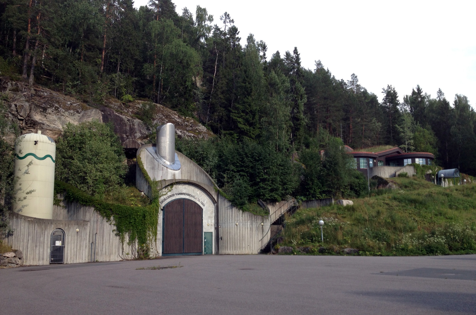 Skullerud vannrenseanlegg i skogen ved Skullerud, Oslo